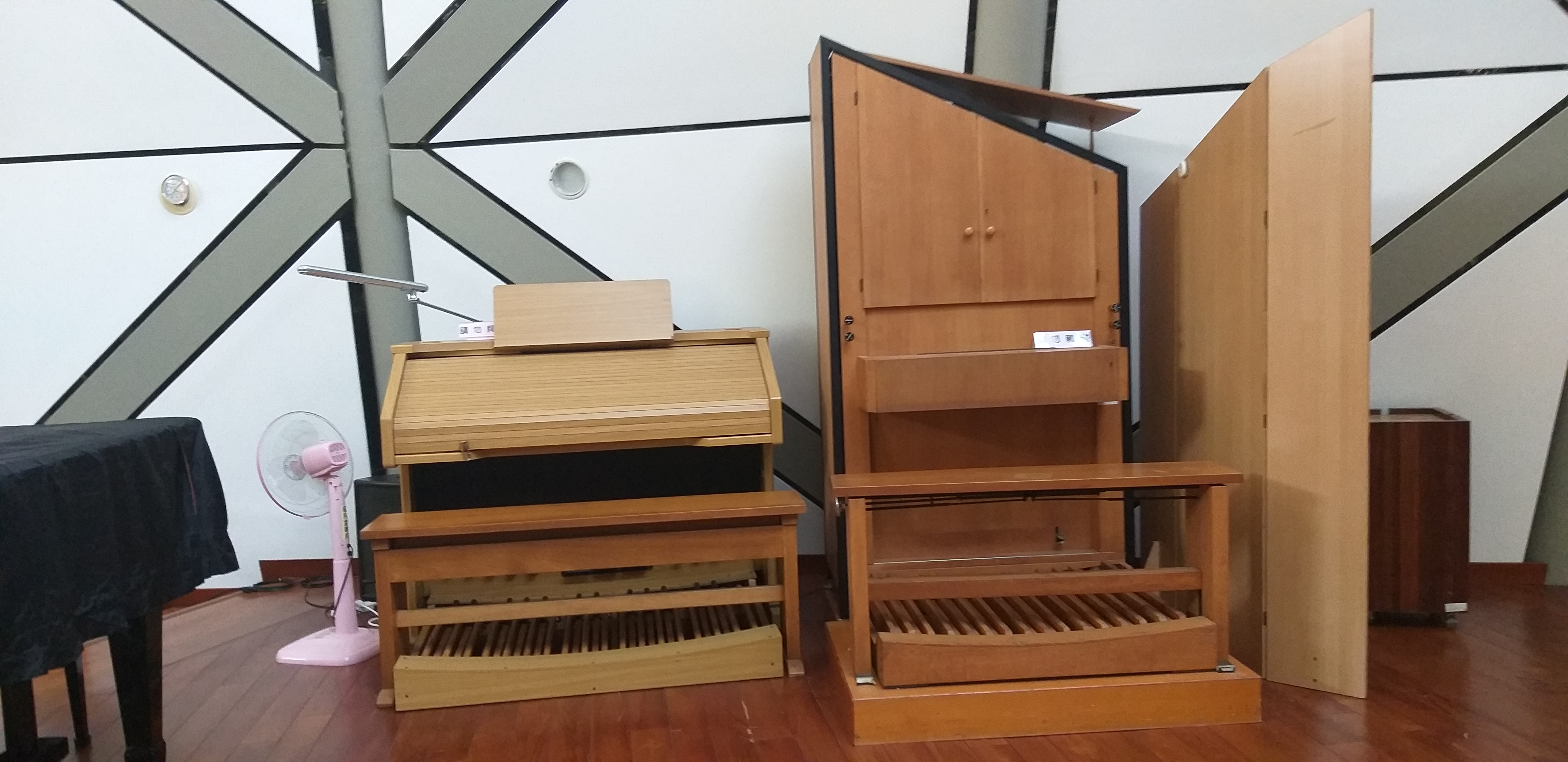 中文（台灣）: 雙連長老教會，紀以前的台北中山北路一帶，荒涼的石頭路間成立了一所「牛埔庄講義所」，從最初提供外國宣教士聚會的場所，進而成立雙連教會，再到改建成現代化建築，雙連長老教會不僅開教界先河，成立雙連幼稚園，還致力關懷視障和老年族群。三芝安養院區。 0601818,121.5210143, 雙連長老教會台北市中山北路2 段111號座標25.0601818,121.5210143